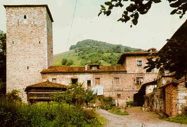 Torre y Palacio de Villanueva vistos desde su fachada principal